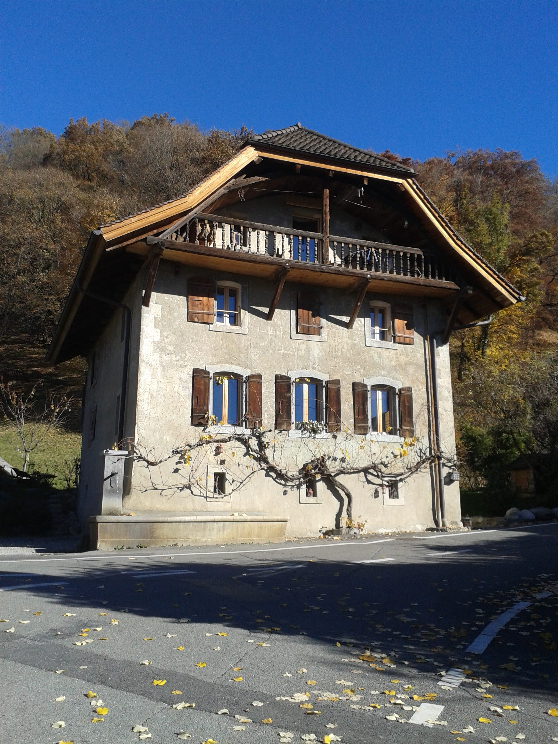 Maison vigneronne en pierre et fontaine.